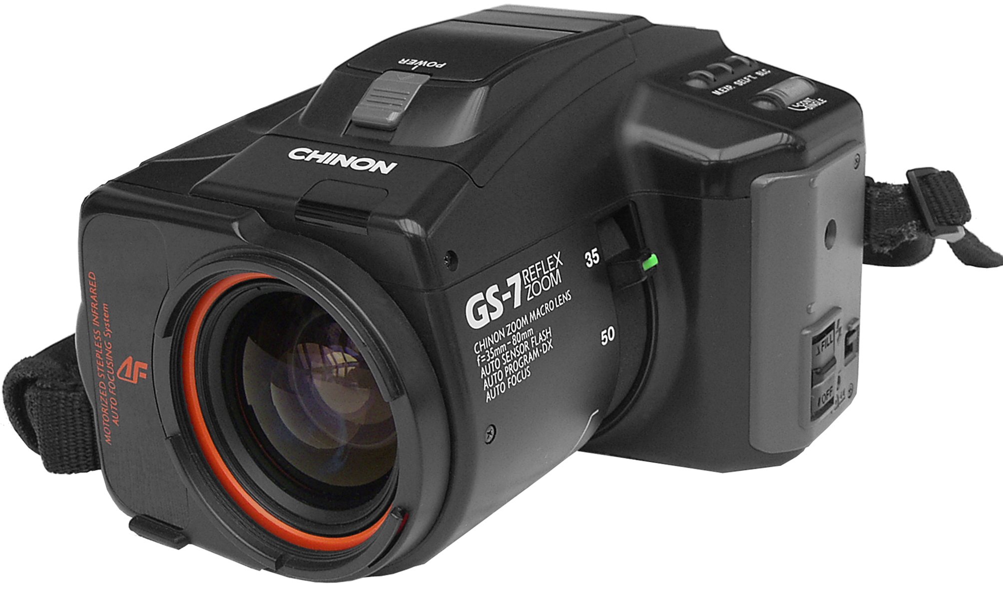 Sieht schon beeindruckend aus, wenn man die rechte Hand durch die Schlaufe steckt und dann dieses Aufnahmegerät ans Auge hält. Mit den Maßen 12x9x12 cm hat es nicht gerade die Maße eines ordinären Fotoapparates - es ist aber einer. "Bridgekamera" sagt man zu diesen Dingern, weil sie die Eigenschaften von Spiegelreflexkamera und Kompaktkamera in sich vereinigen sollen. Nun ja, die Eigenschaft "kompakt" kommt nicht gerade ausgeprägt rüber - und SLR ohne Wechselobjektive ... ich weiß nicht. Ein Zoombereich von 35 bis 80 Millimeter reißt einen nicht gerade vom Hocker, genauso wenig wie der Zeitenbereich von 1/4 Sek. bis 1/300 Sek. Aber bequem zu bedienen ist diese Kleinbild-Autofokuskamera auf jeden Fall. Man hat sie gut "im Griff" und nach Betätigen des Power-Schalters (der auch den Blitz ausfährt) ist man schon schussbereit. Nur die Brennweite muss man am manuellen Zoom noch auswählen. Der Blitz schaltet bei nicht ausreichenden Lichtverhältnissen automatisch zu. Das kann man aber auch verhindern - genauso wie das Gegenteil: man kann das Blitzen erzwingen. Möglich sind neben Einzelaufnahmen auch Serienbilder, Mehrfachbelichtungen und Selbstauslöseraufnahmen. Auch eine Gegenlichtkorrektur ist eingebaut. Chinon nannte die Kamera "Genesis" und bei Foto-Quelle hieß sie "Revue Zoom Reflex Compact AF" Ach ja: ordentlich scharfe Bilder macht sie auch. Herzlichen Dank an Familie Oelsner!